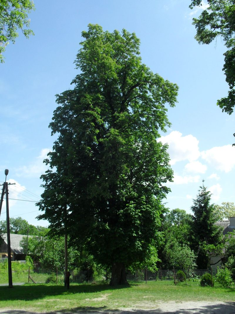 Kasztanowiec zwyczajny odwołany pomnik przyrody w Kozielcu. Drzewo było objęte ochroną w latach 1991 - 2018 i posiadało odpowiednio obwód 294 - 320 cm.